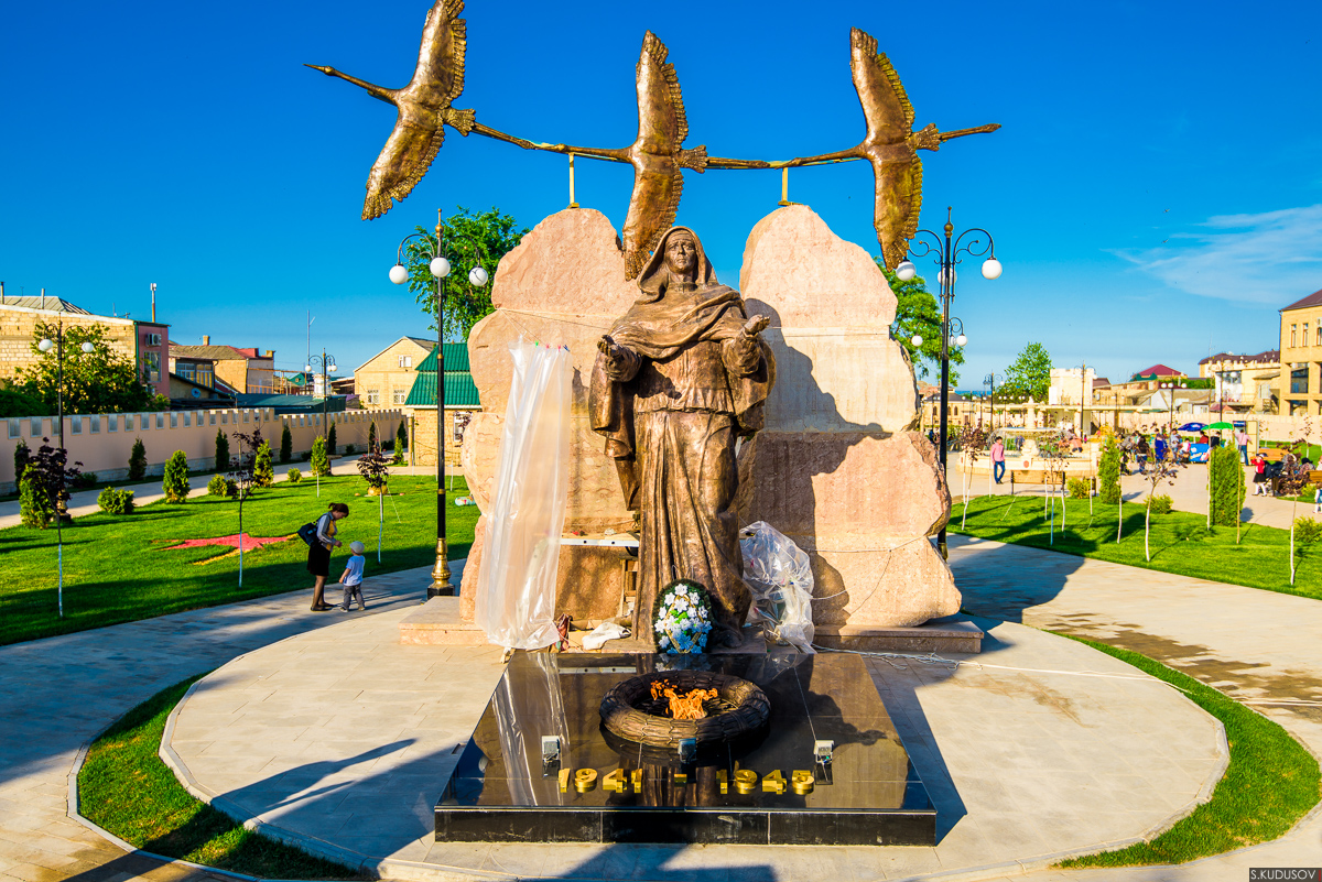 Мемориал скорбящей матери в городе Дербент